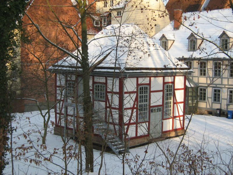 Synagoge in Göttingen, 2008 aus Bodenfelde dorthin versetzt